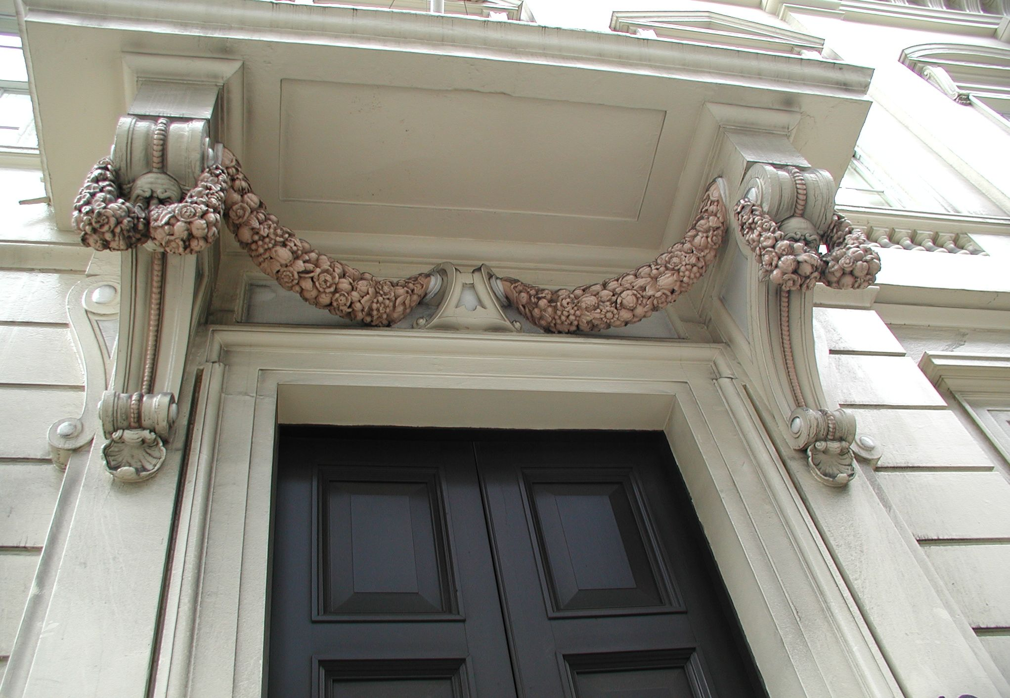 Garlands on the doorpost of City of London Club, 19 Old Broad Street, London.